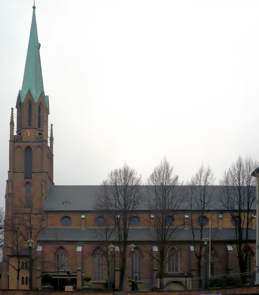 St. Dionysiuskirche in Essen-Borbeck